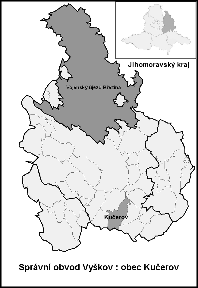 Hranice Kučerov (Vyškov- czech republic)